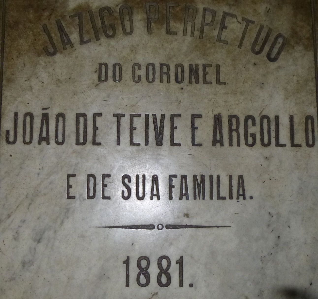 Grabplatte Joao de Teive Argallo Franziskanerkirche Salvador Bahia